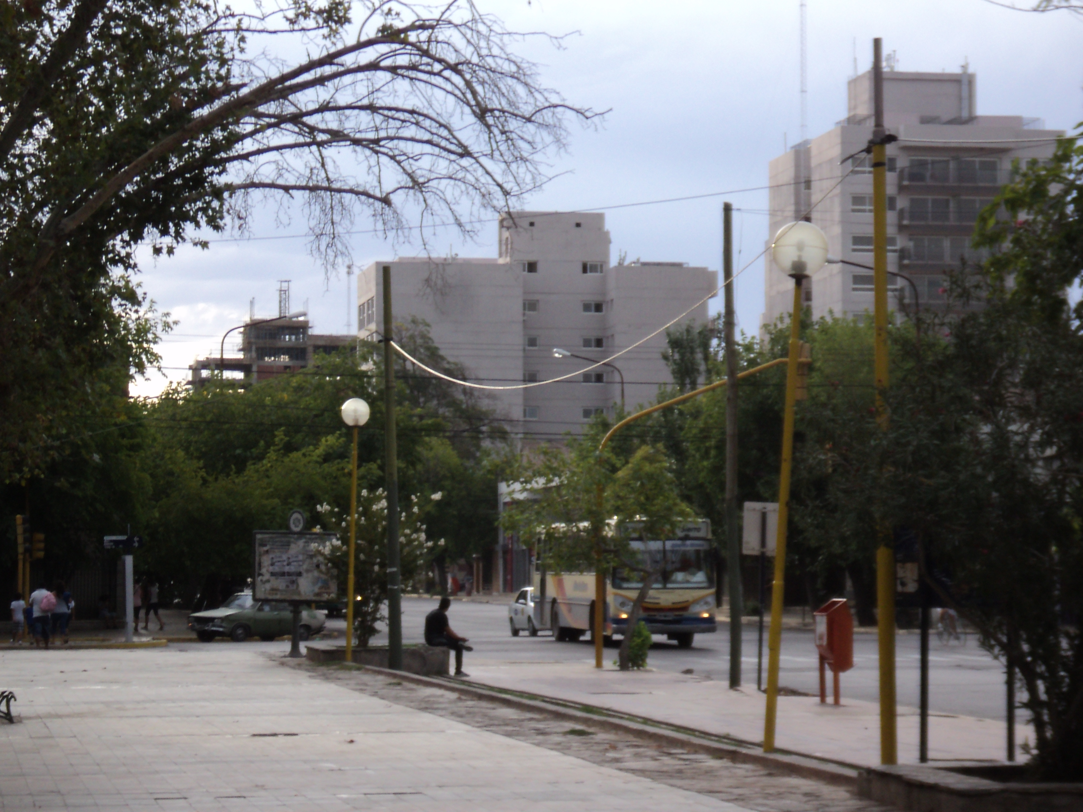 La esquina de la plaza Laprida rodeade de edificaciones de a altura